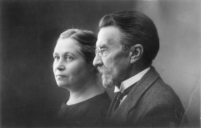 MuuseumikoguFotokoguOlemusfotoSäilivusmääramata legend Naisega ?. Fotograaf teadmata kommentaar Fk 2668:1 - 178 Eesti Vabariigi II maailmasõjaeelsed üld - ja kohalikud laulupeod, heliloojad (sh eriti Miina Härma elu ja töö), kirjanikud, kultuuritegelased, seltskondlikud koosviibimised jm. Fotod kuulusid Miina Härmale (1864 - 1941) ja tema õepoeg Olev Reintalule (1903 - 1960) ja saadi 1945. aastal Tartu Kroonuaia tänav 12 - 4 (ERMi v.v. akt 158, 15.05.1949; v.v. akt 272 lisa 10.05.1949). Legendeeris ja andis üle ERMi Näitusemaja projektijuht Jana Reidla. v.v. akt 1999:59